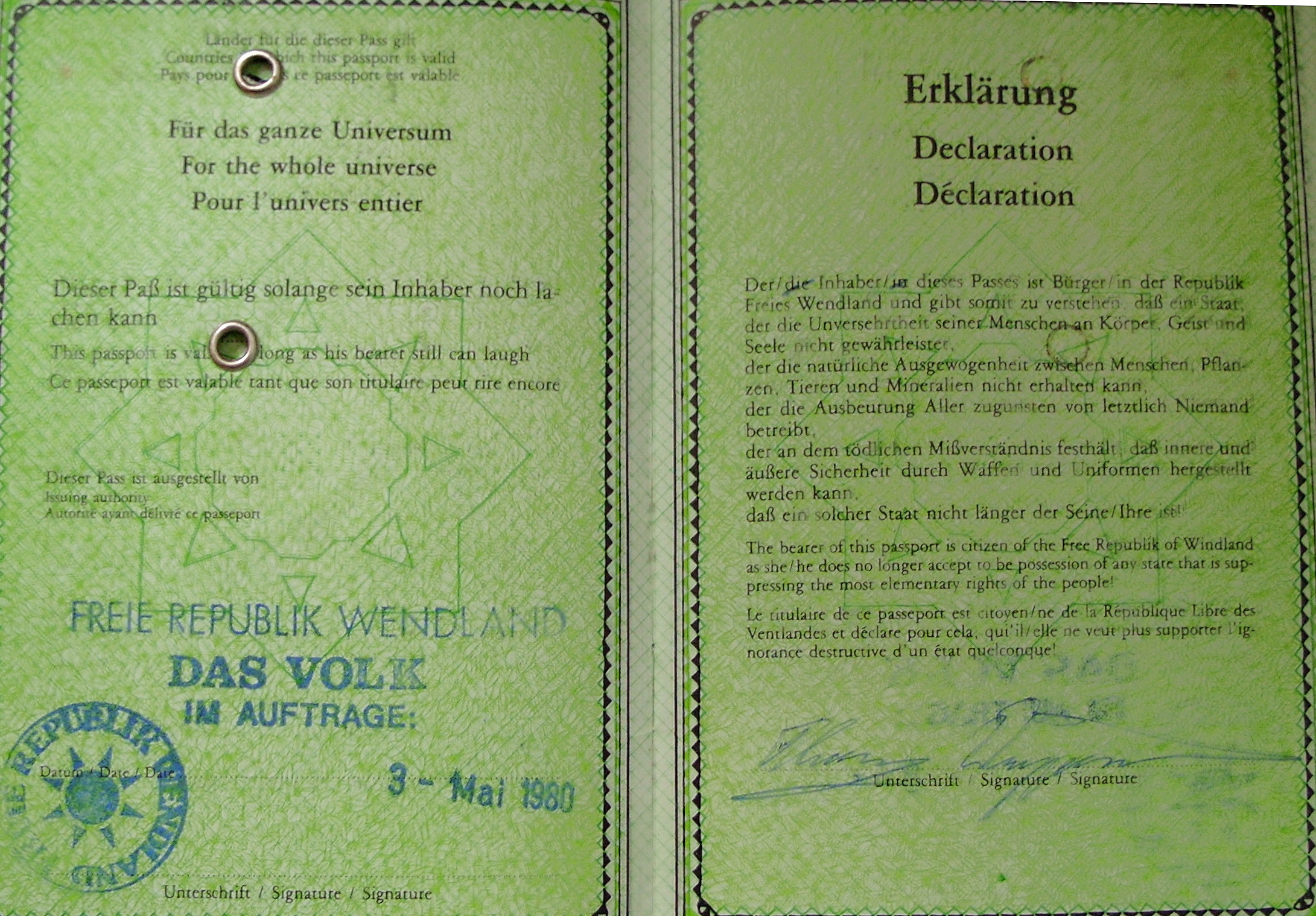 Ausweis der Republik Wendland, 1980